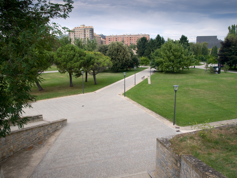 Parque de la Ciudadela, en Pamplona